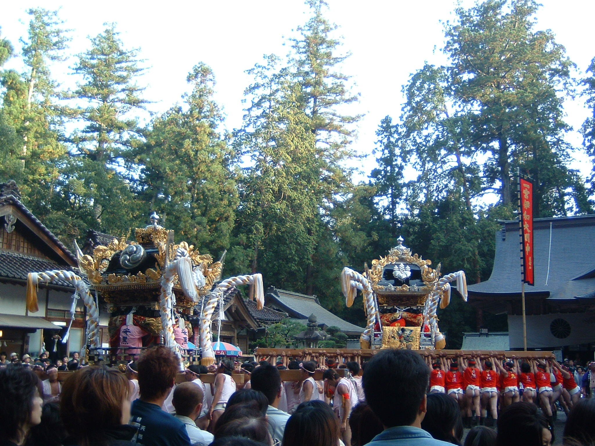 Iwa-jinja(伊和神社) akimatsuri(autumn festival)